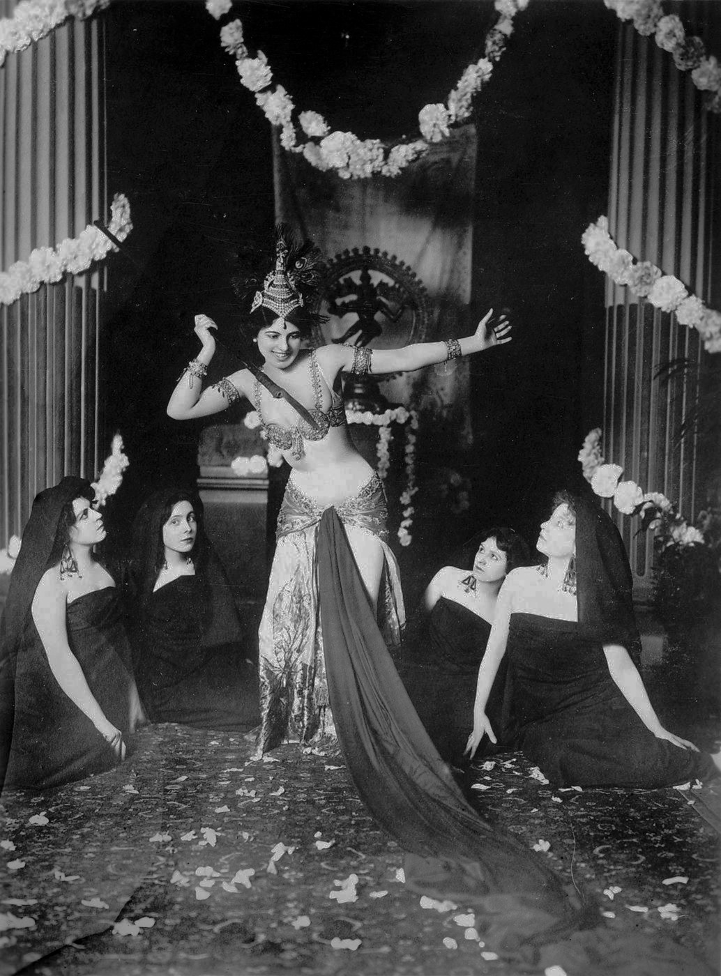 Madame MacLeod (future Mata Hari) éxécutant des danses brahmaniques dans la bibliothèque du Musée Guimet de Paris 13-3-1905